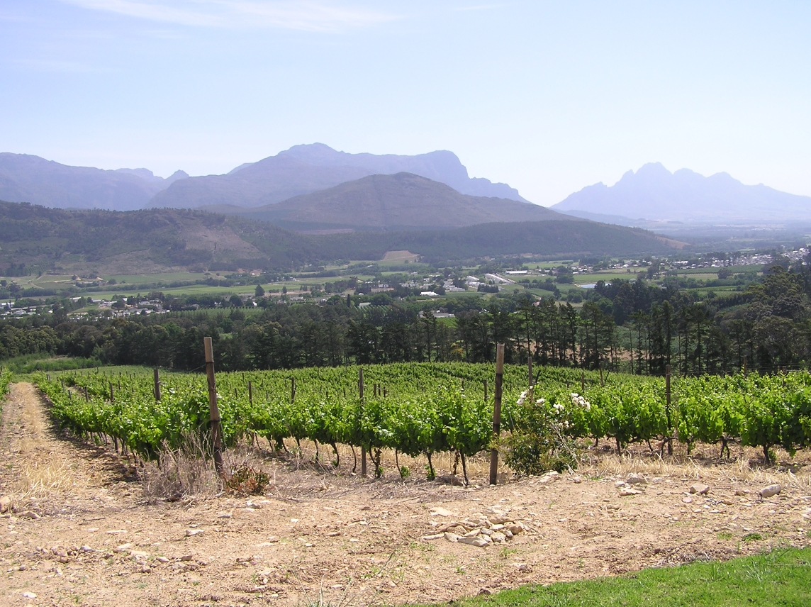 Südafrika, Franschhoek, Überblick